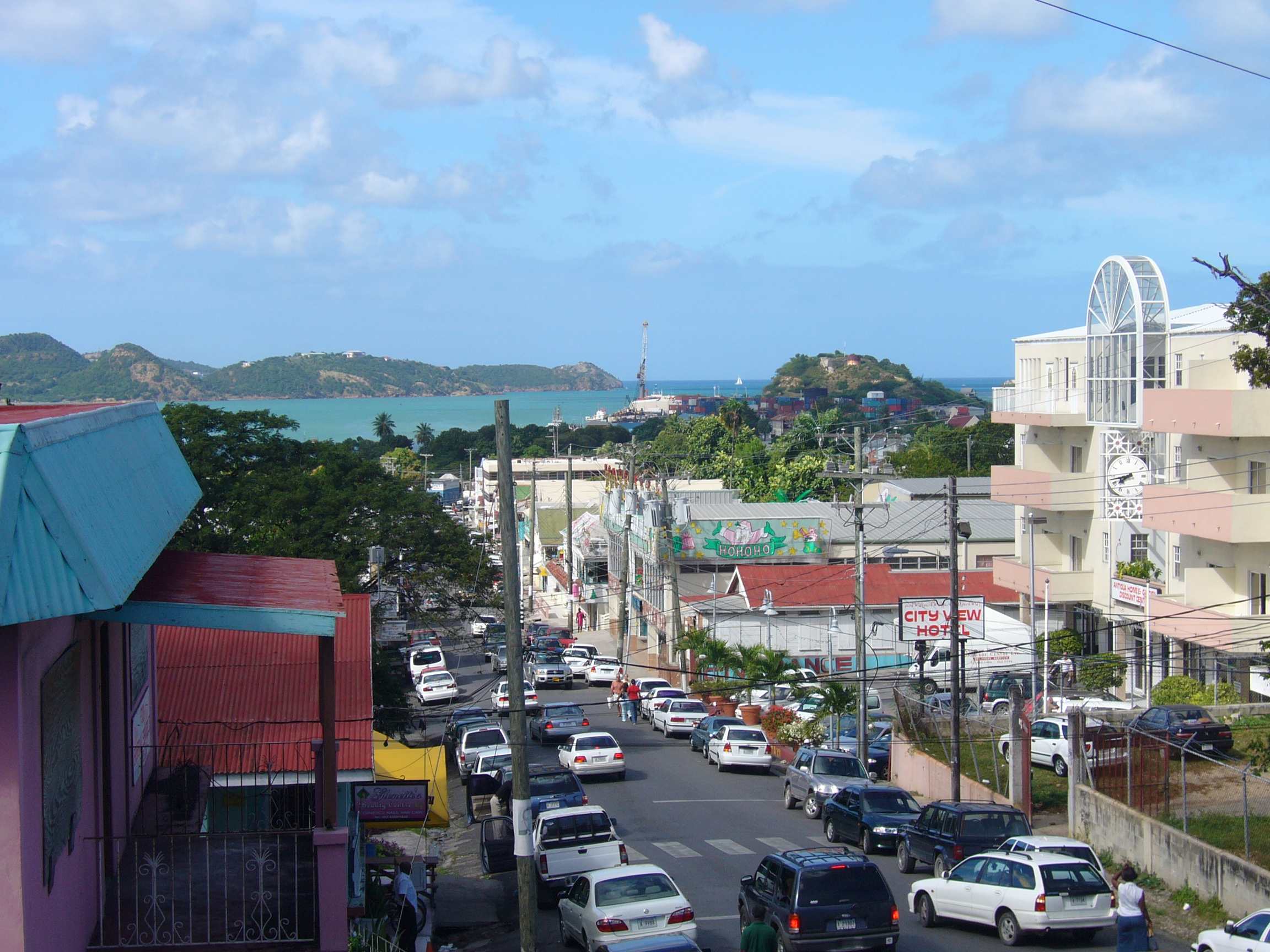 Street in St. John's, Antigua and Barbuda